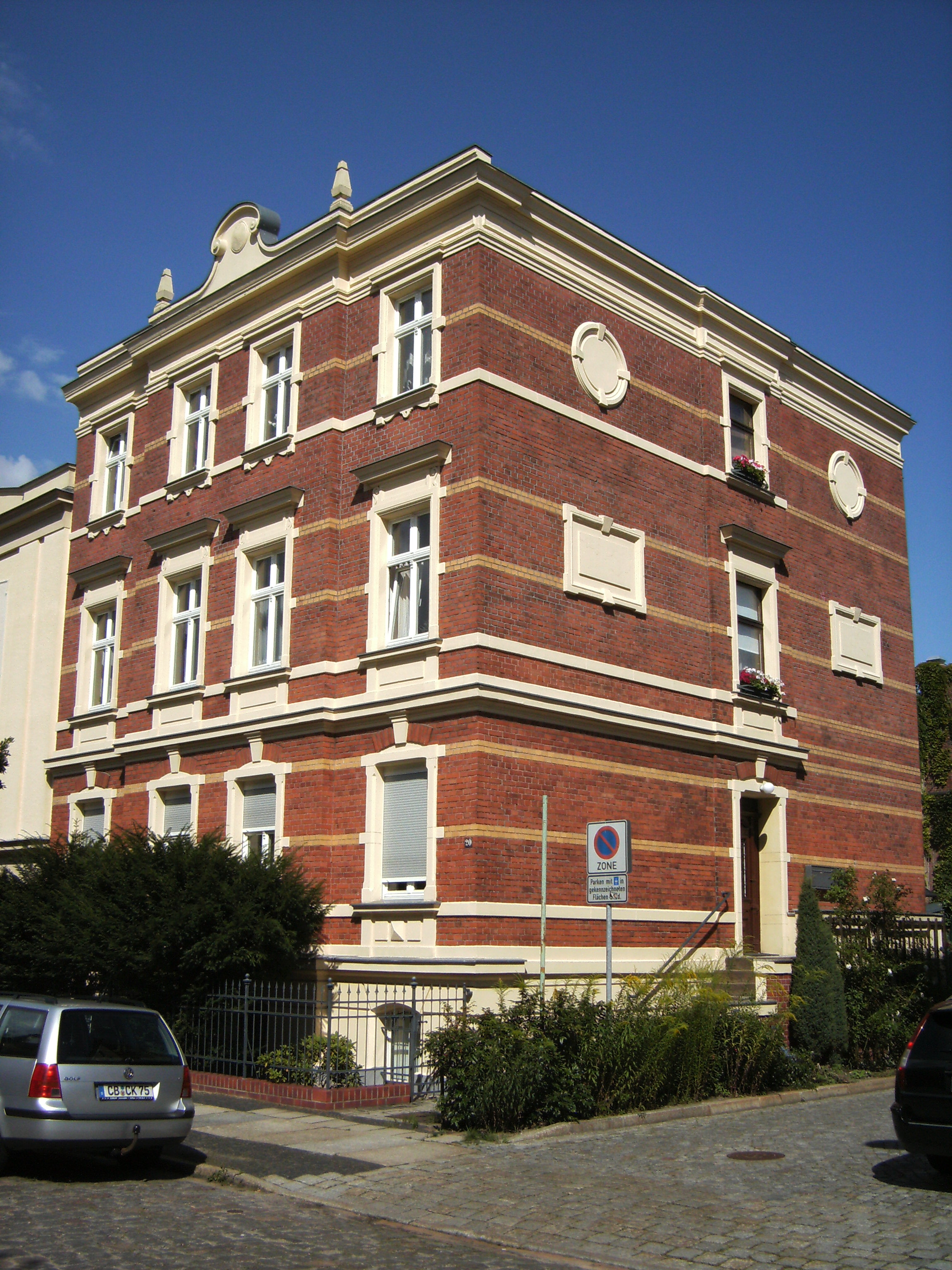 Wernerstr.